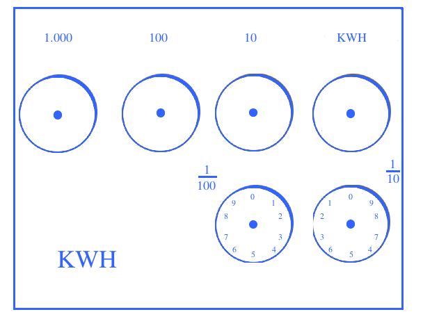 نظام التسجيل بغير مؤشر في مقياس التيار الحثي